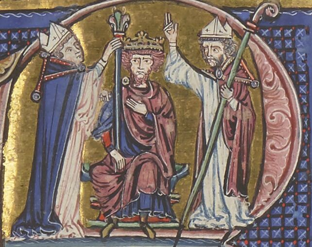 King Baldwin I of Jerusalem